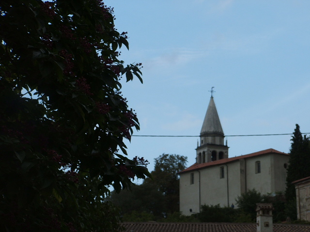 Osp